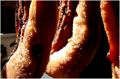 晾晒完成的广式腊肉，可看见其表面渗出的些微脂肪。